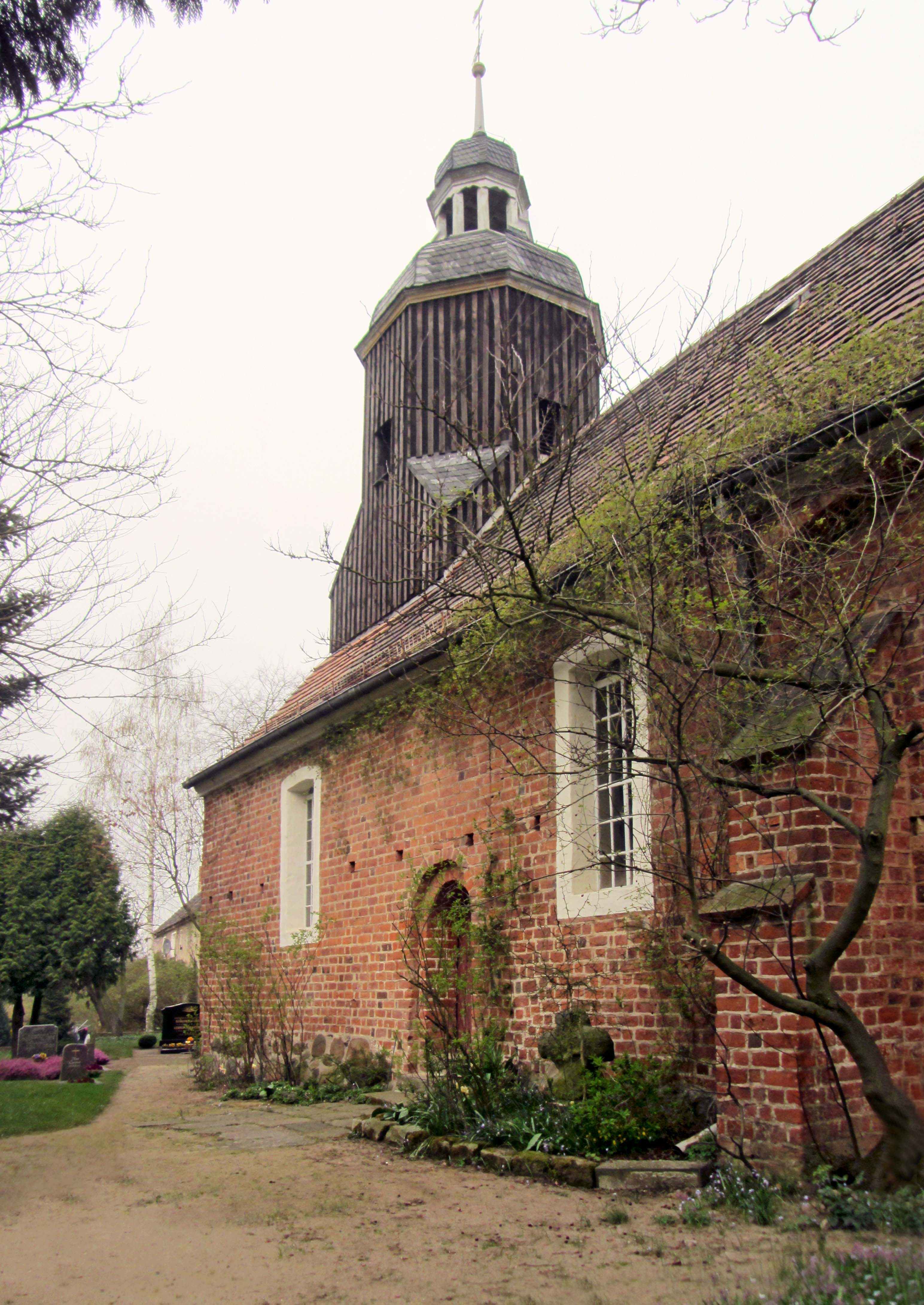 Kirche und Steinkreuz, Hauptstraße in Uebigau-Wahrenbrück OT Saxdorf